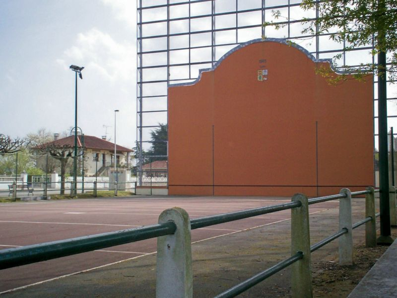 Fronton de Pardias